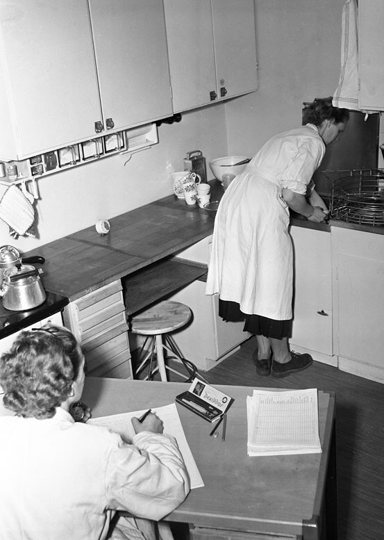 Hemmens forskningsinstitut. En kvinna arbetar i köket, en annan kvinna antecknar och klockar tiden (Rålambsvägen 8 och 10 i Stockholm)